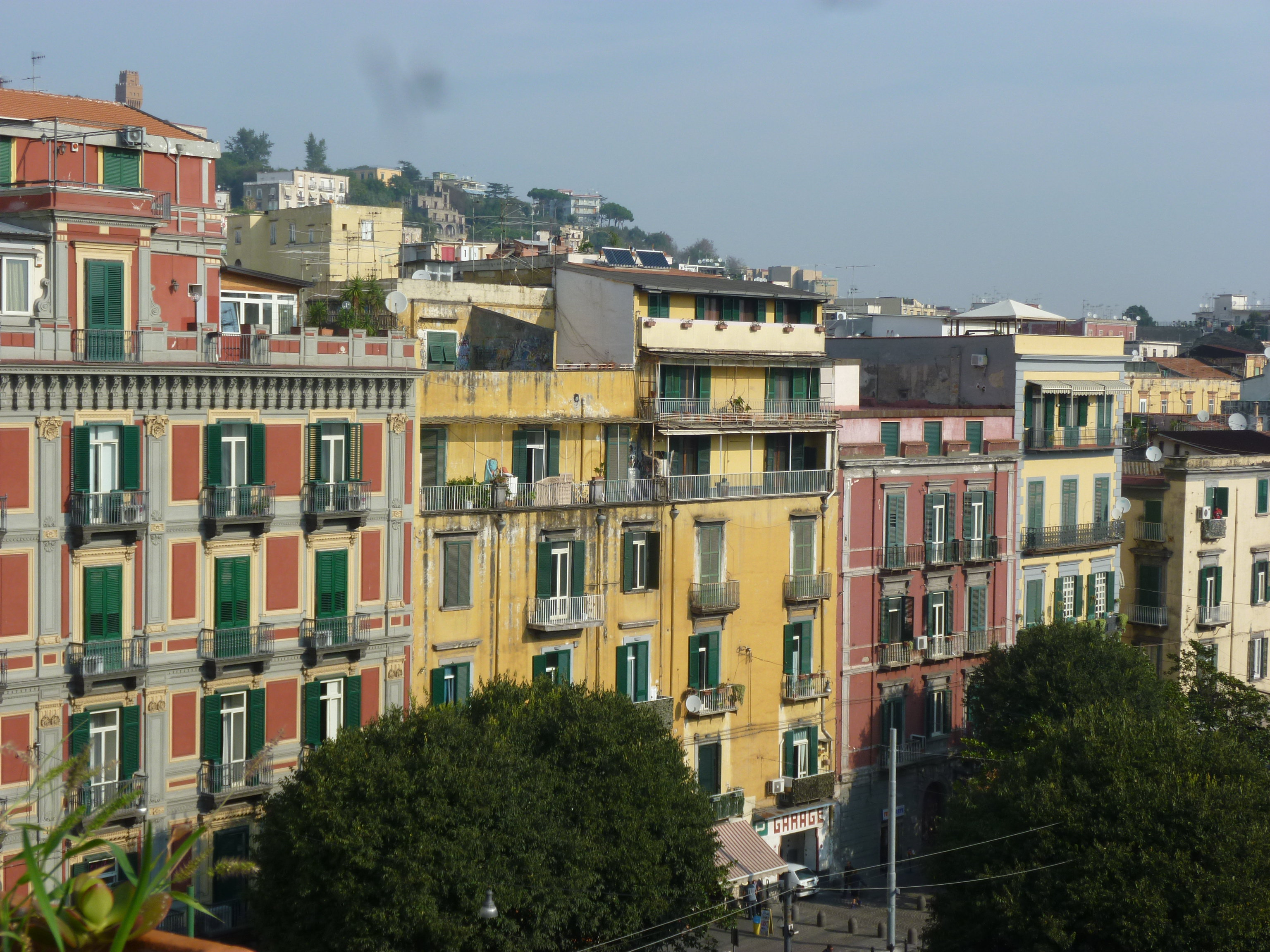 Napoli